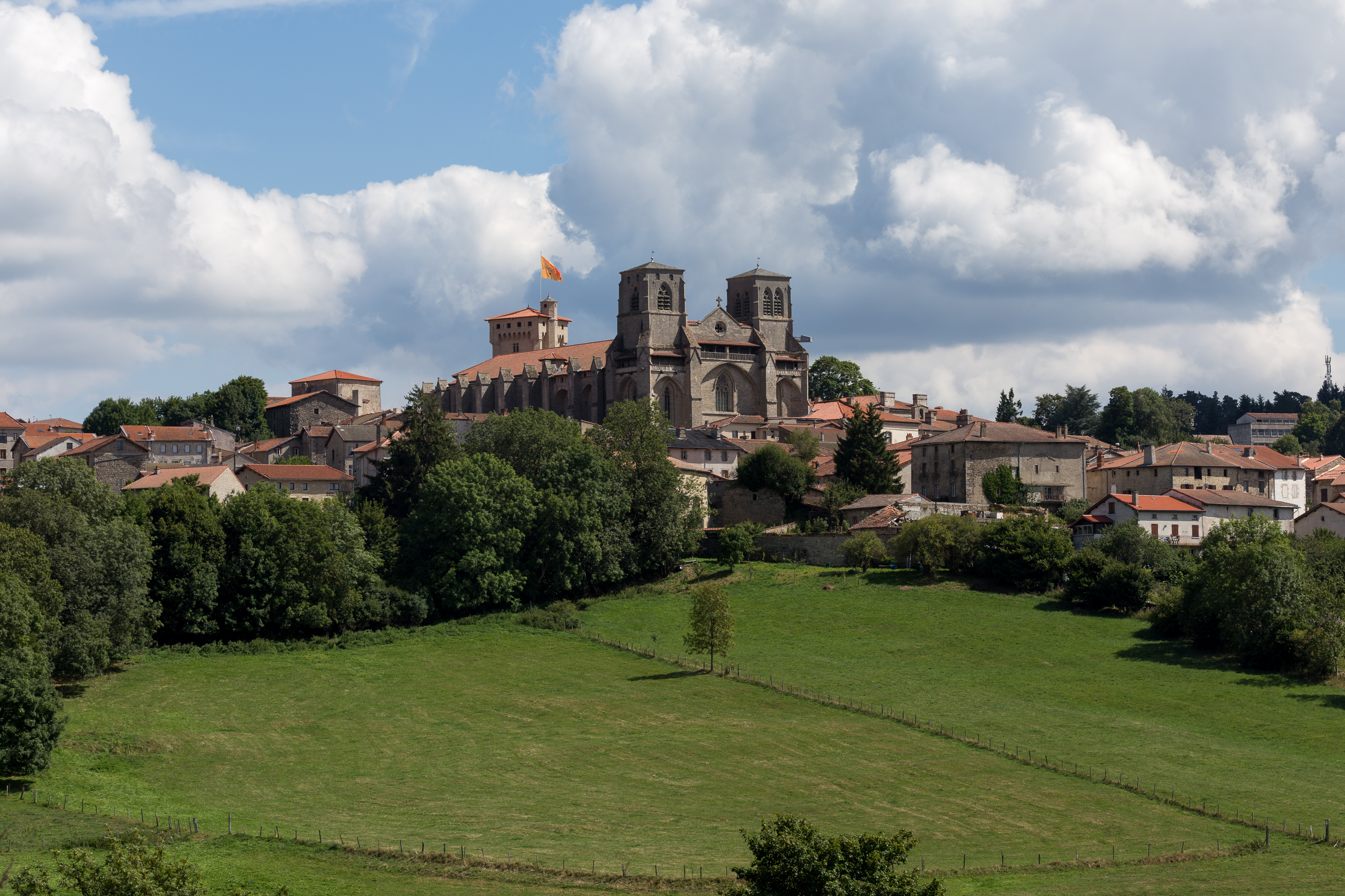 Abbatiale Saint-Robert de La Chaise-Dieu : vue depuis la route de Brioude. .